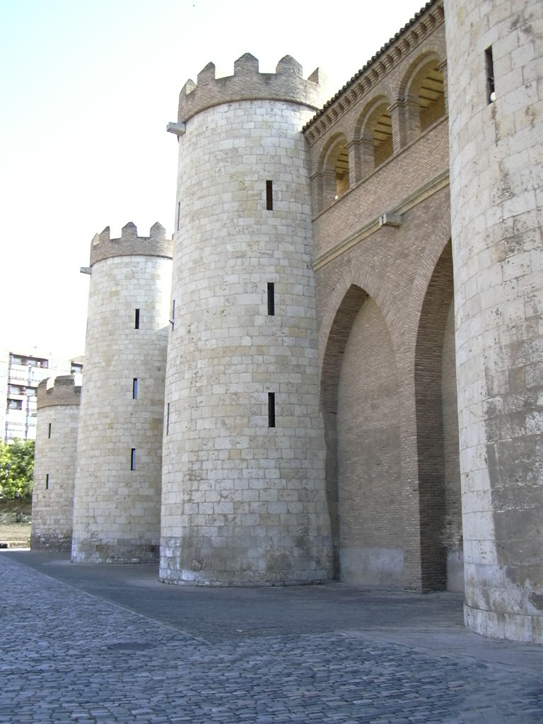 La Aljafería - Entrada